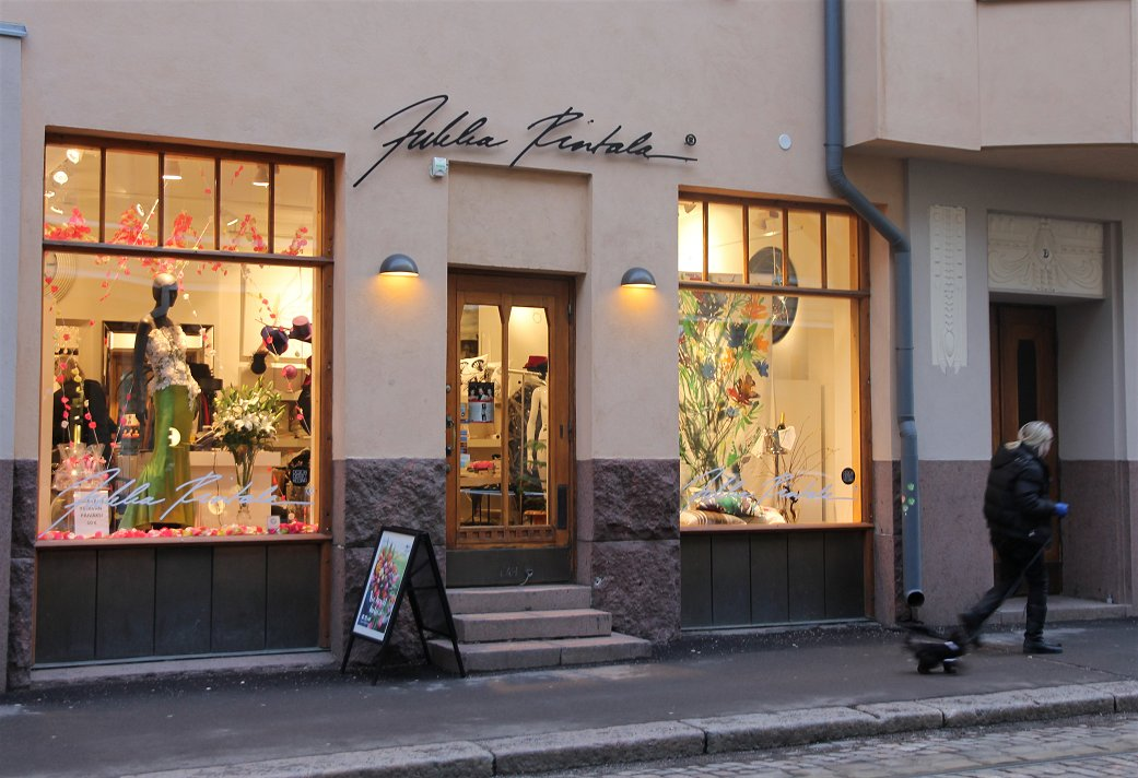 Suomen tunnetuimpiin muotisuunnittelijoihin kuuluvan Jukka Rintalan myymälä ja ateljee Fredrikinkadulla Helsingin Kampissa.